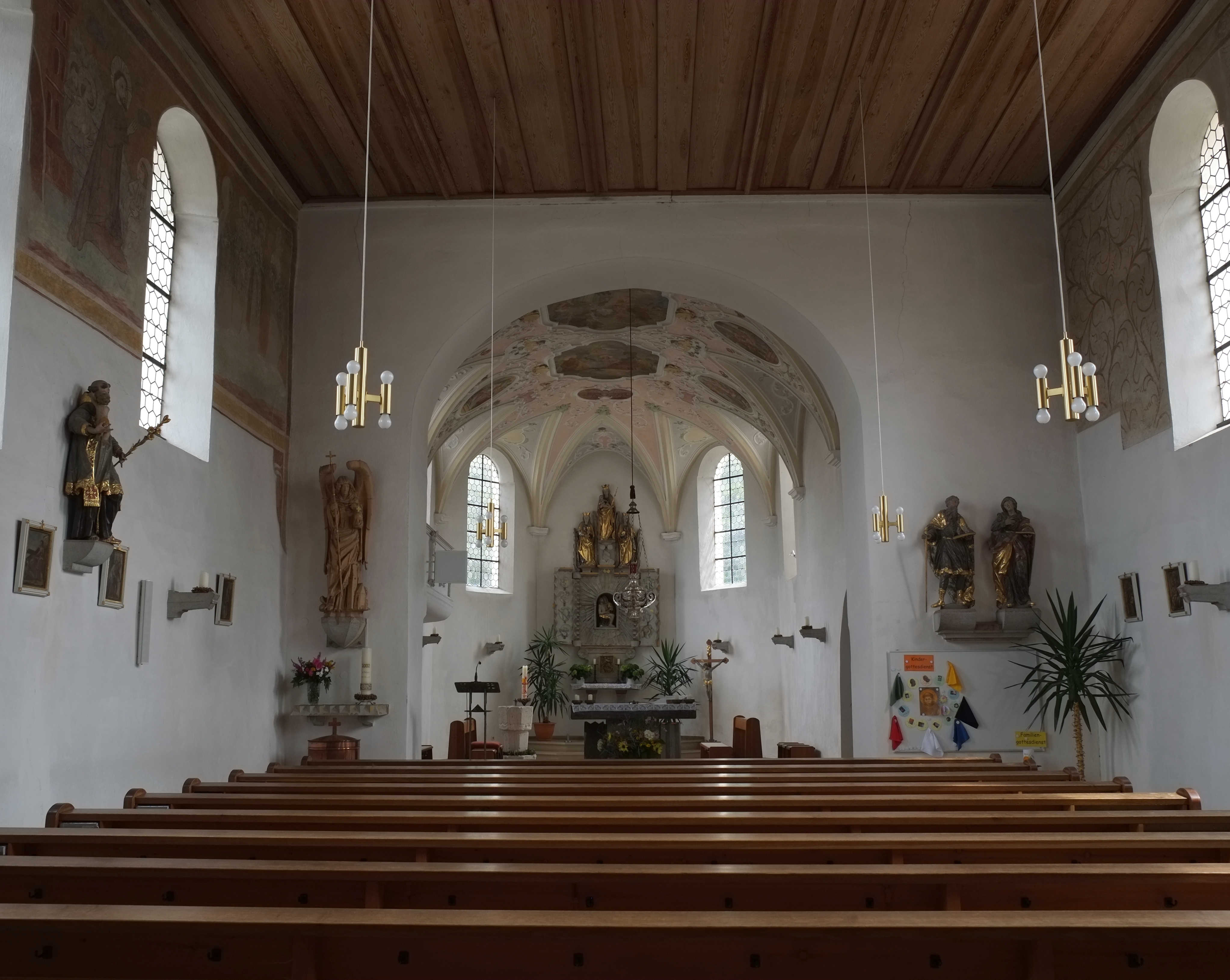 Katholische Pfarrkirche St. Michael in Wörleschwang im Landkreis Augsburg (Bayern, Deutschland)